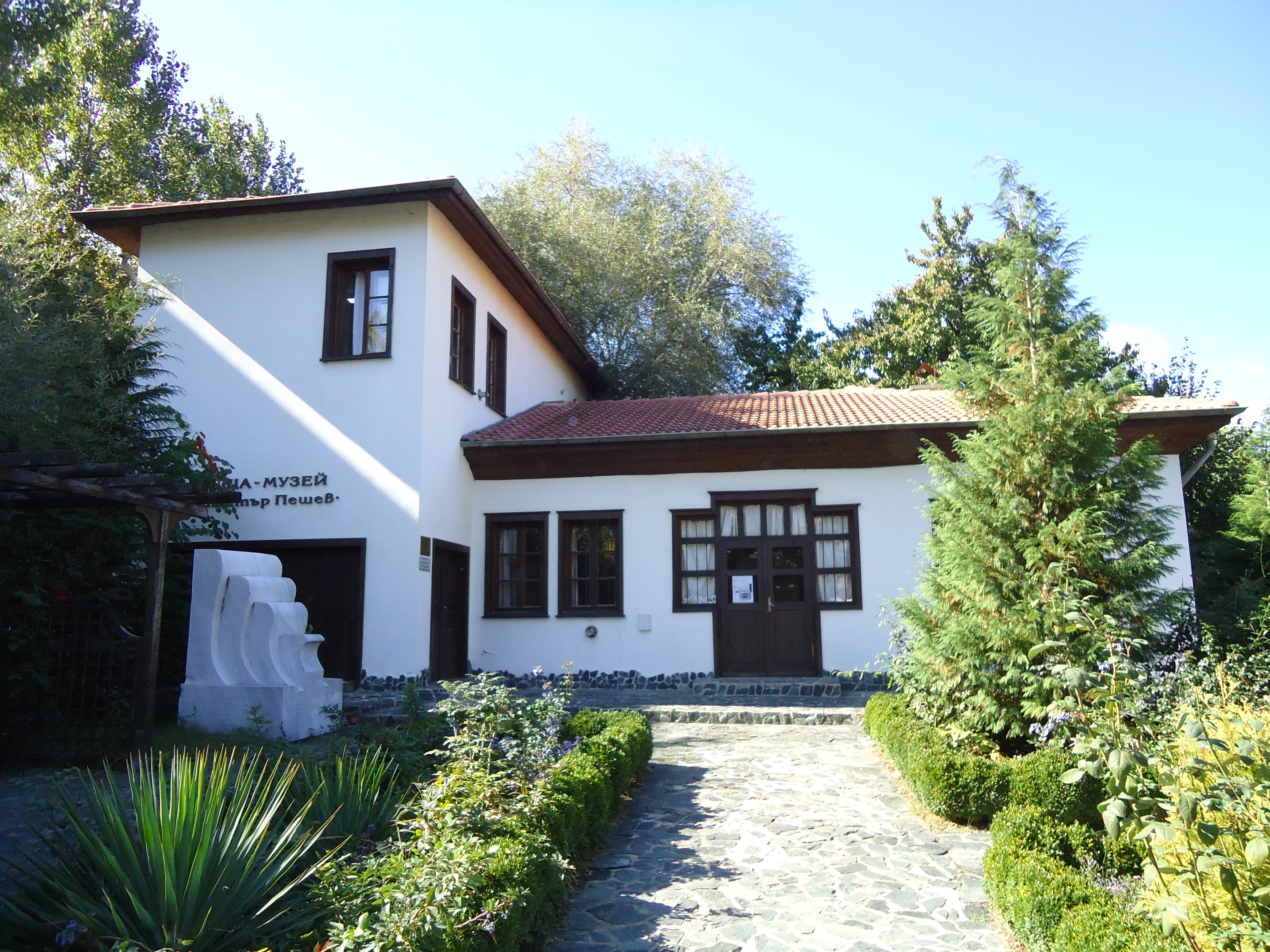 Къщата на Димитър Пешев в гр.Кюстендил